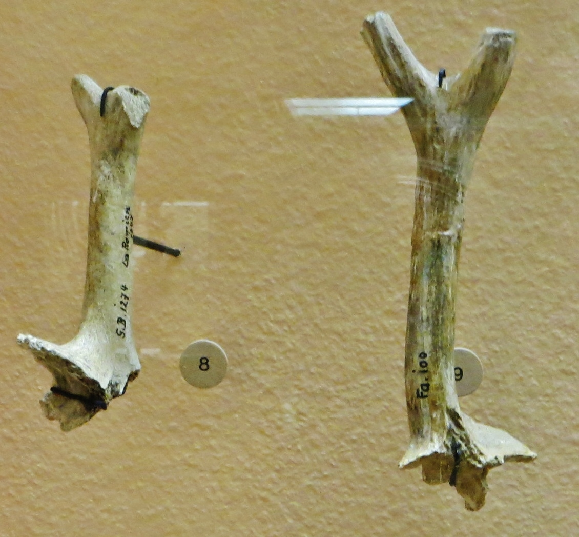 Fossil of Procervulus - Took the picture at Natural History Museum, Basel